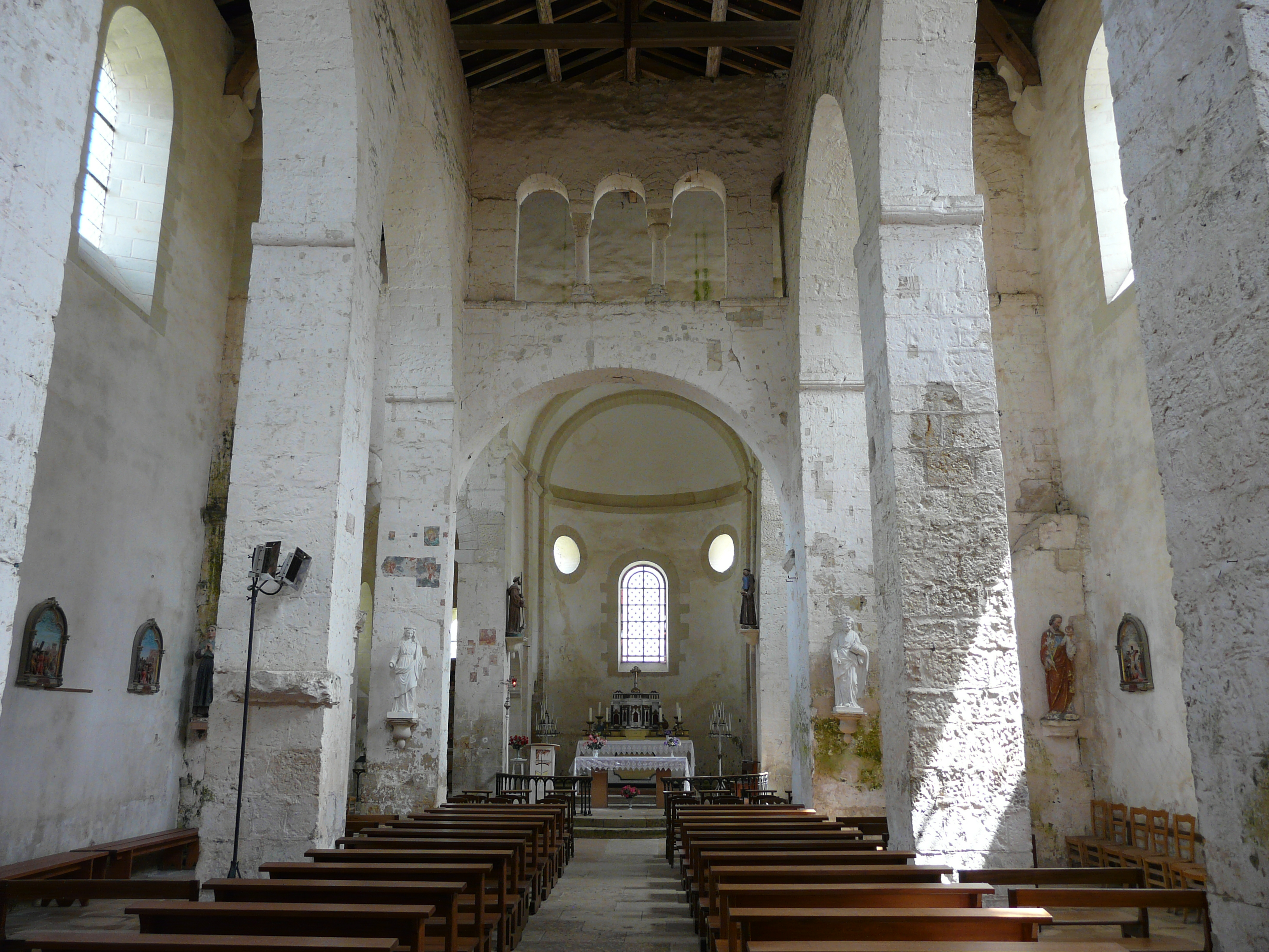 La nef et le chœur de l'église, Saint-Généroux, Deux-Sèvres, France